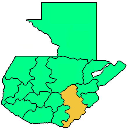 Mappa della diocesi cattolica di Jalapa, in Guatemala. Lavoro personale eseguito a partire da questa immagine di Commons. Fonte per i confini delle diocesi